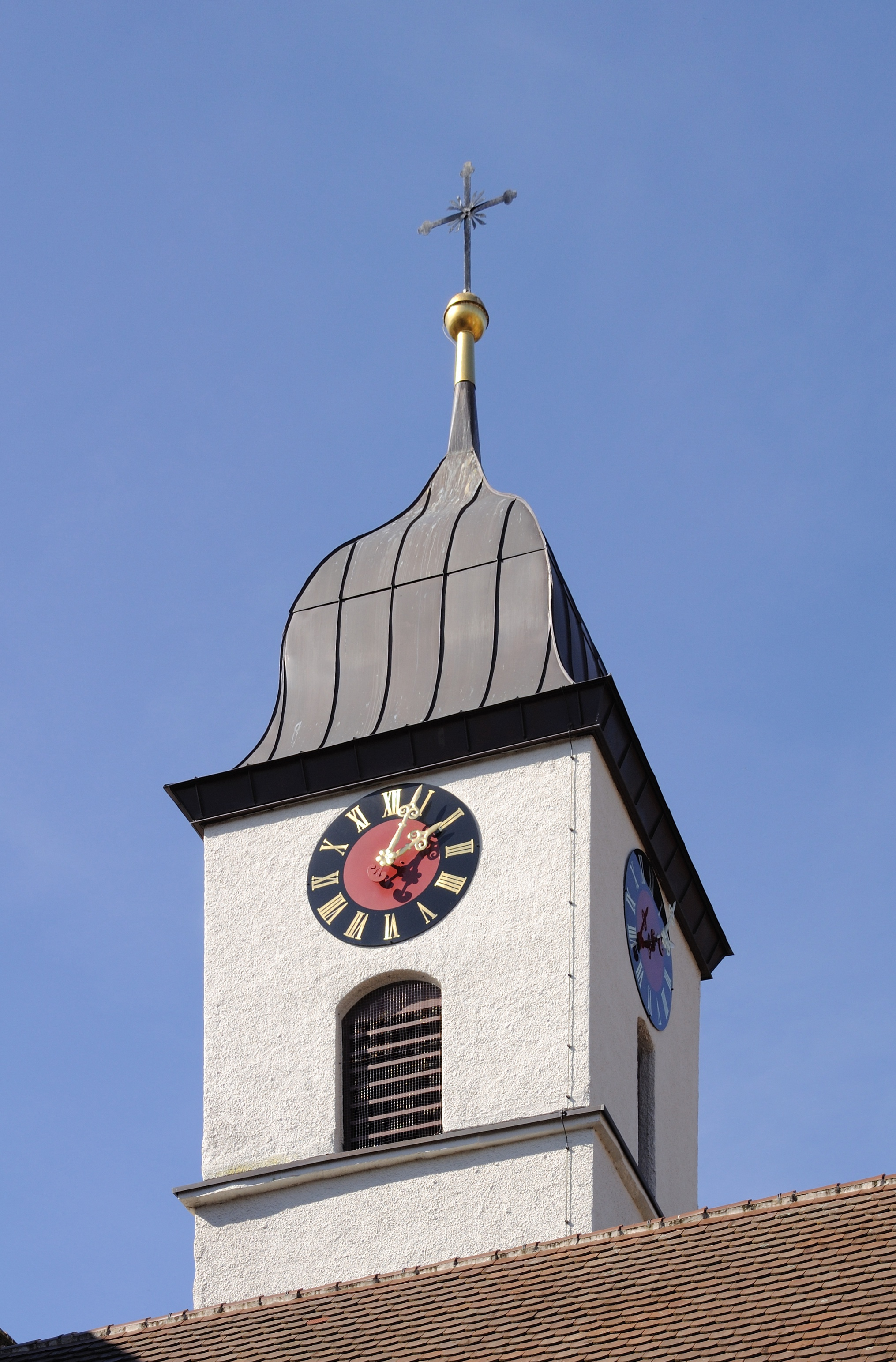 Rheinfelden-Nollingen: St. Felix und Regula, Glockenturm